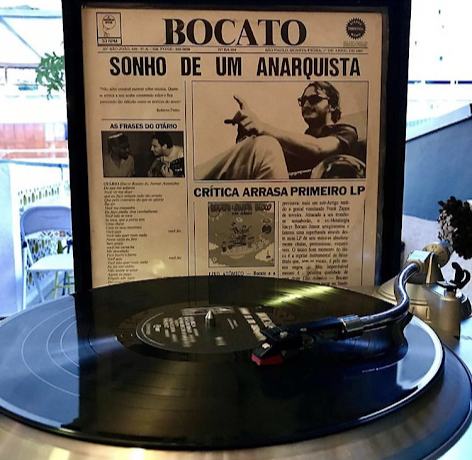 Disco de Bocato - Sonho de um Anarquista sendo tocado